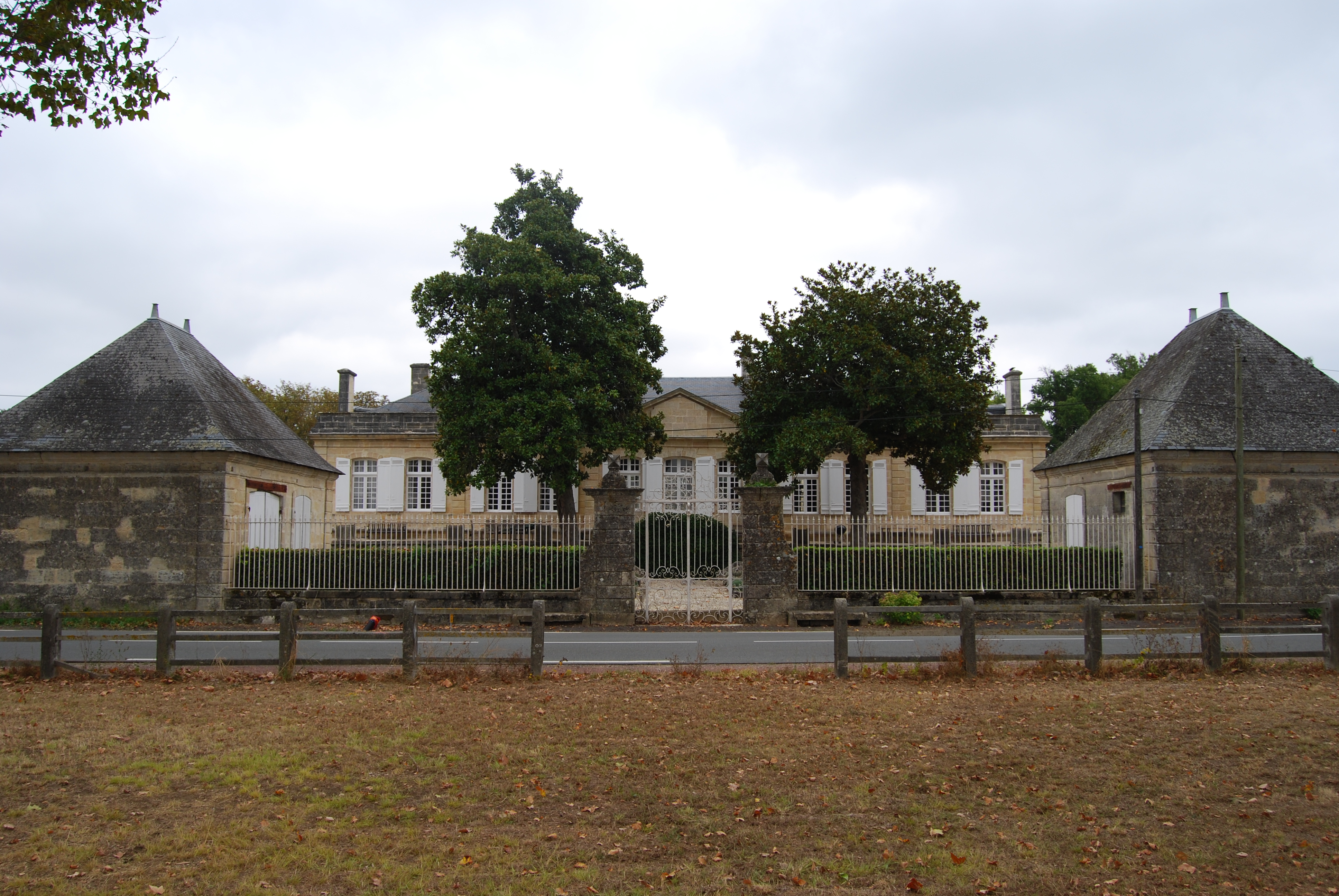 Château de Sainte-Barbe, (Inscrit, 1996)